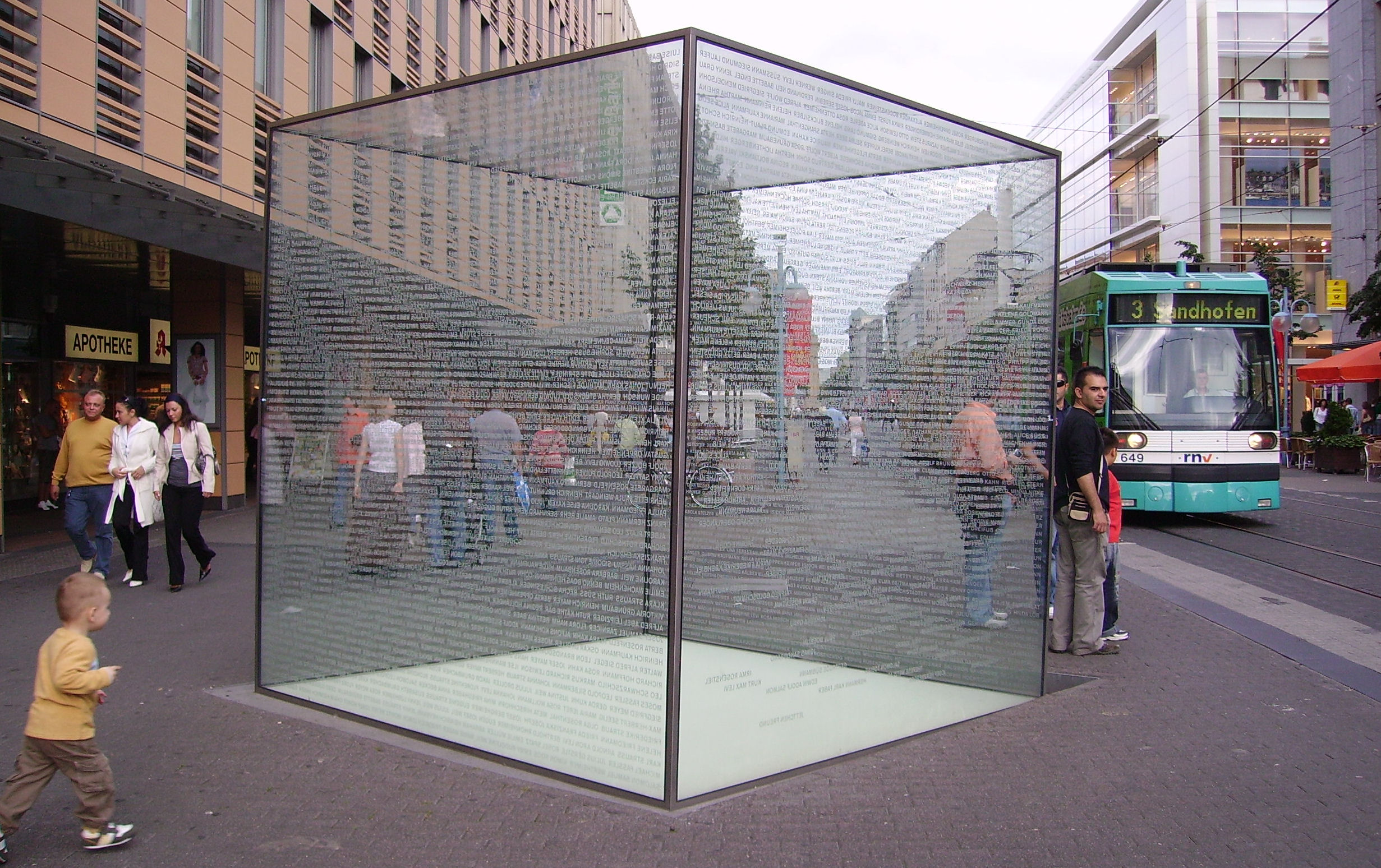 holocaust monument by Jochen Kitzbihler in Mannheim, Germany